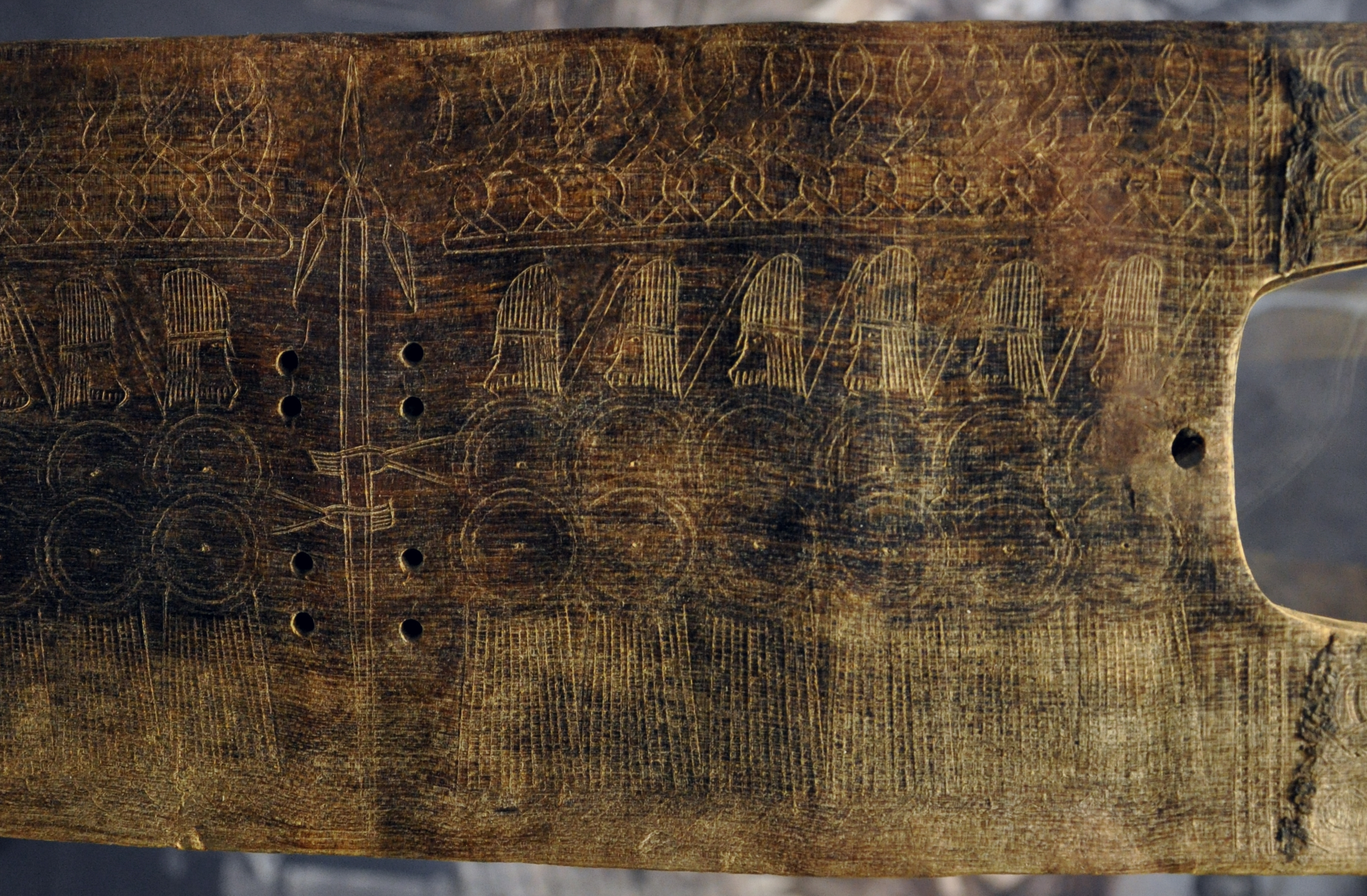 Trossinger Leier, Detail Archäologisches Landesmuseum Baden-Württemberg, Konstanz